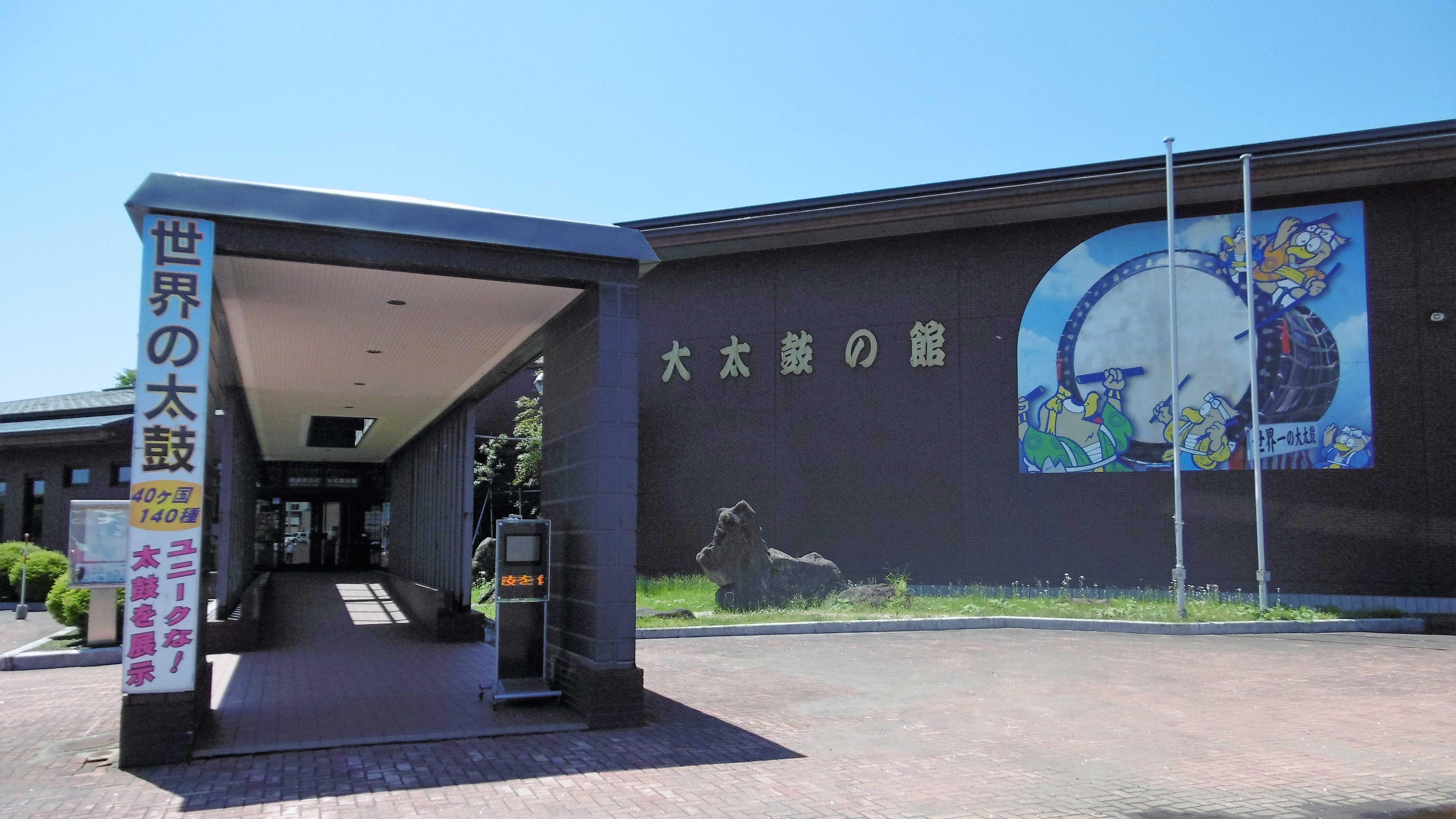 大太鼓の館 （道の駅たかのす）：秋田県北秋田市